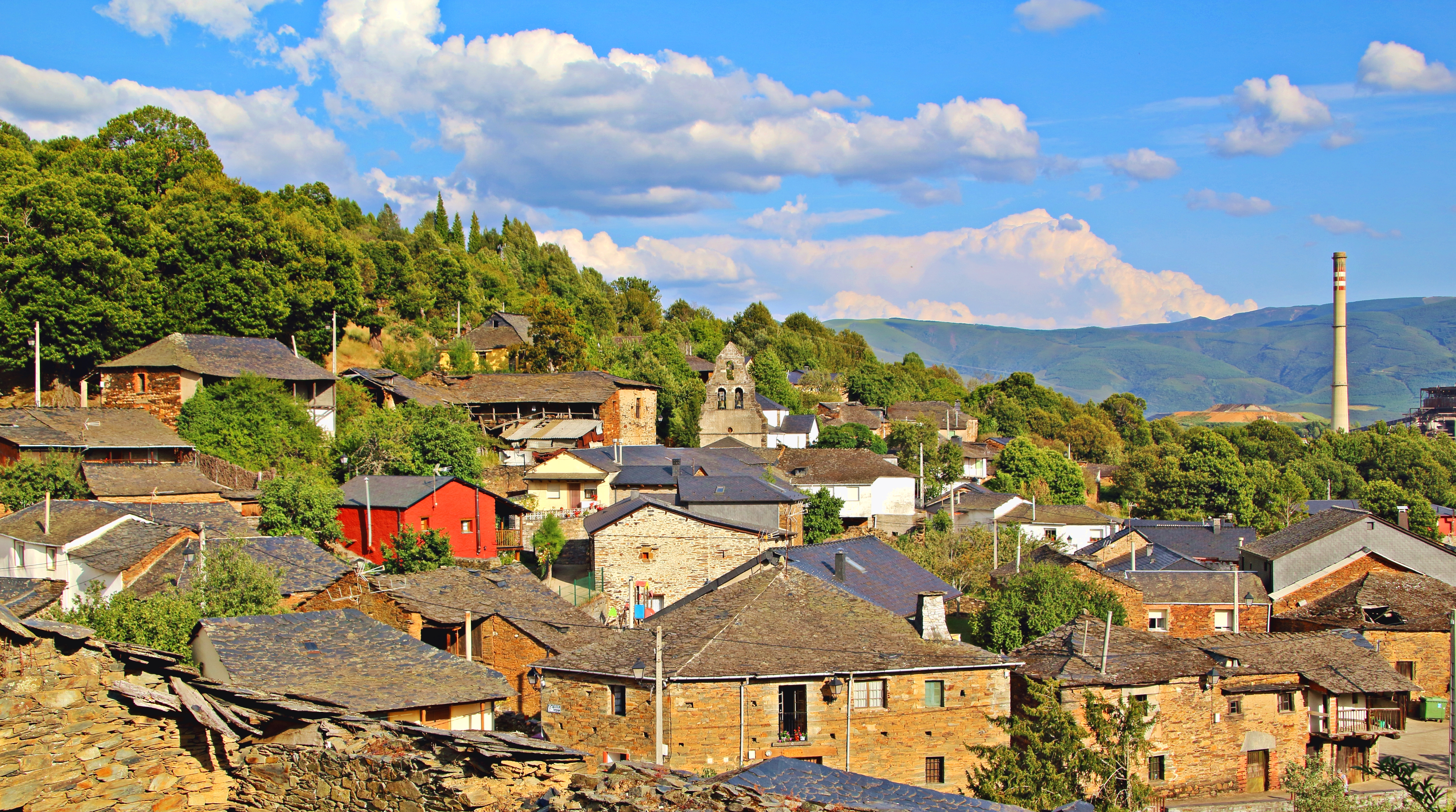 Anllares del Sil, localidad de Páramo del Sil, comarca de El Bierzo, provincia de León.